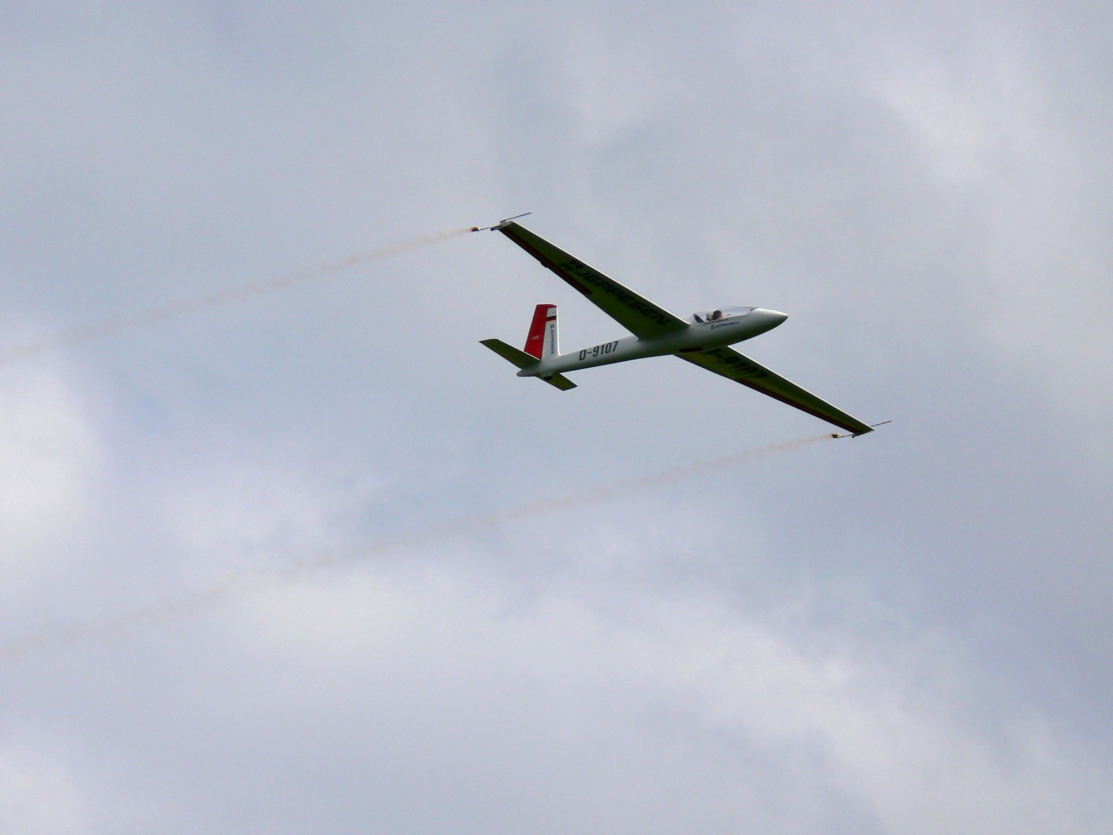 Segelflugzeug Swift S-1. Ein Kunstflug-Segelflugzeug des polnischen Herstellers MDM.